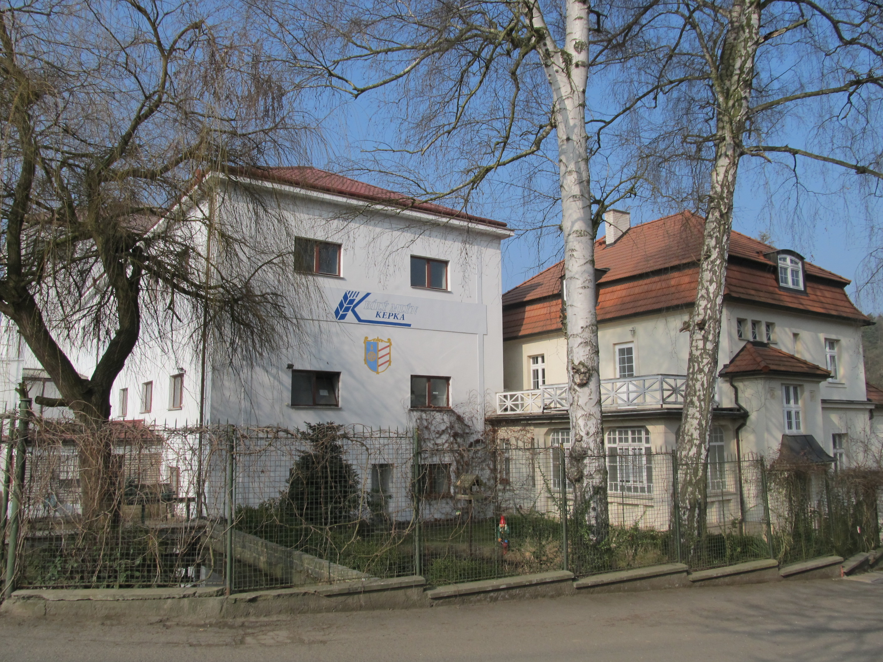 Nová Huť - Bílý mlýn